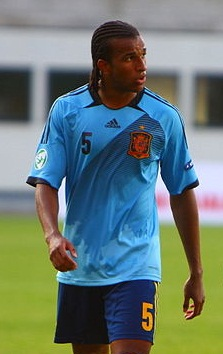 Derik Osede. Sub-19 Portugal vs España.